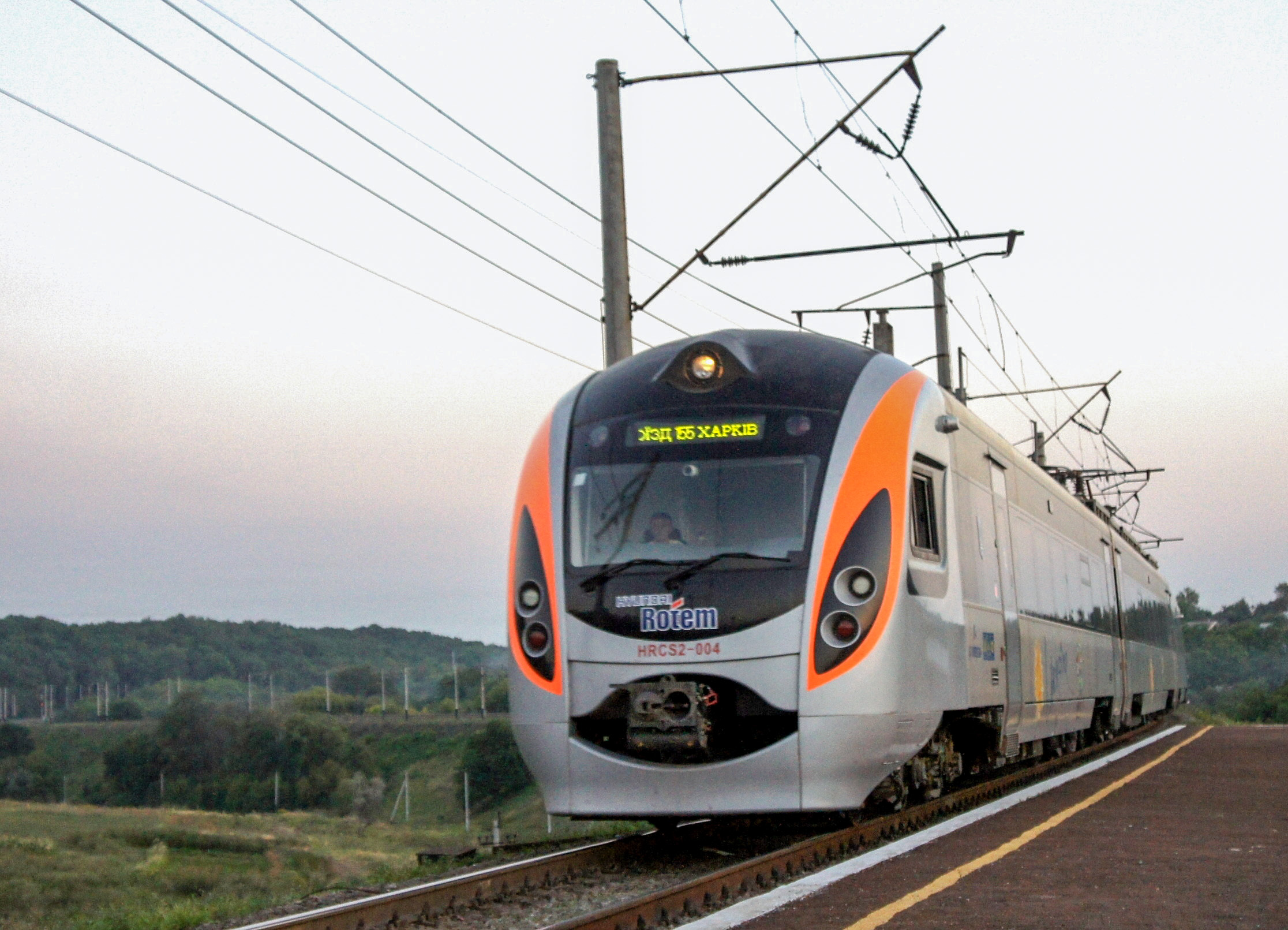 Скоростной поезд "Хёндэ" на перегоне Яковцы-Шведская Могила (Полтава)